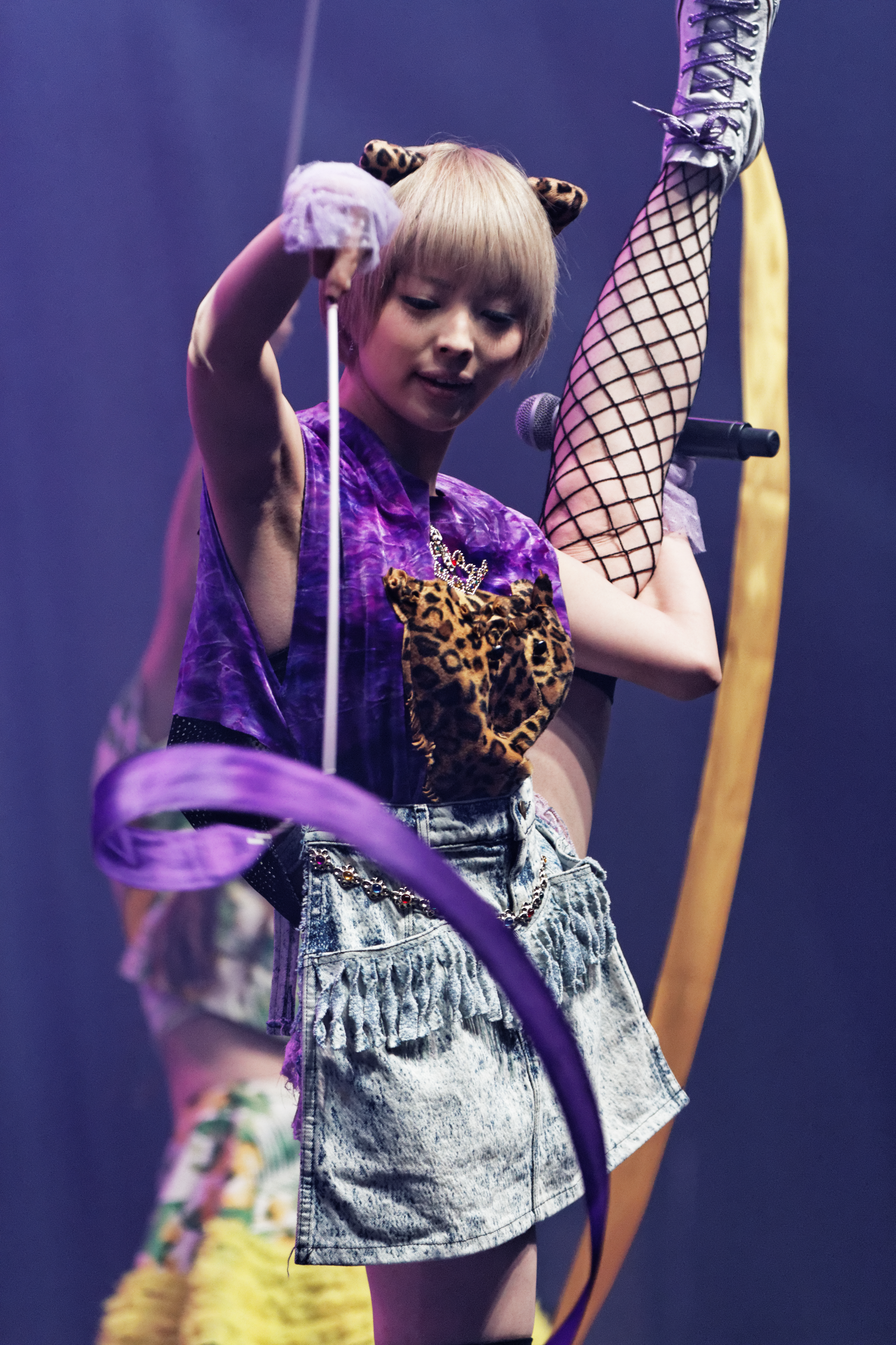 Dempagumi.inc en concert lors du live house du Japan expo Paris 2013.